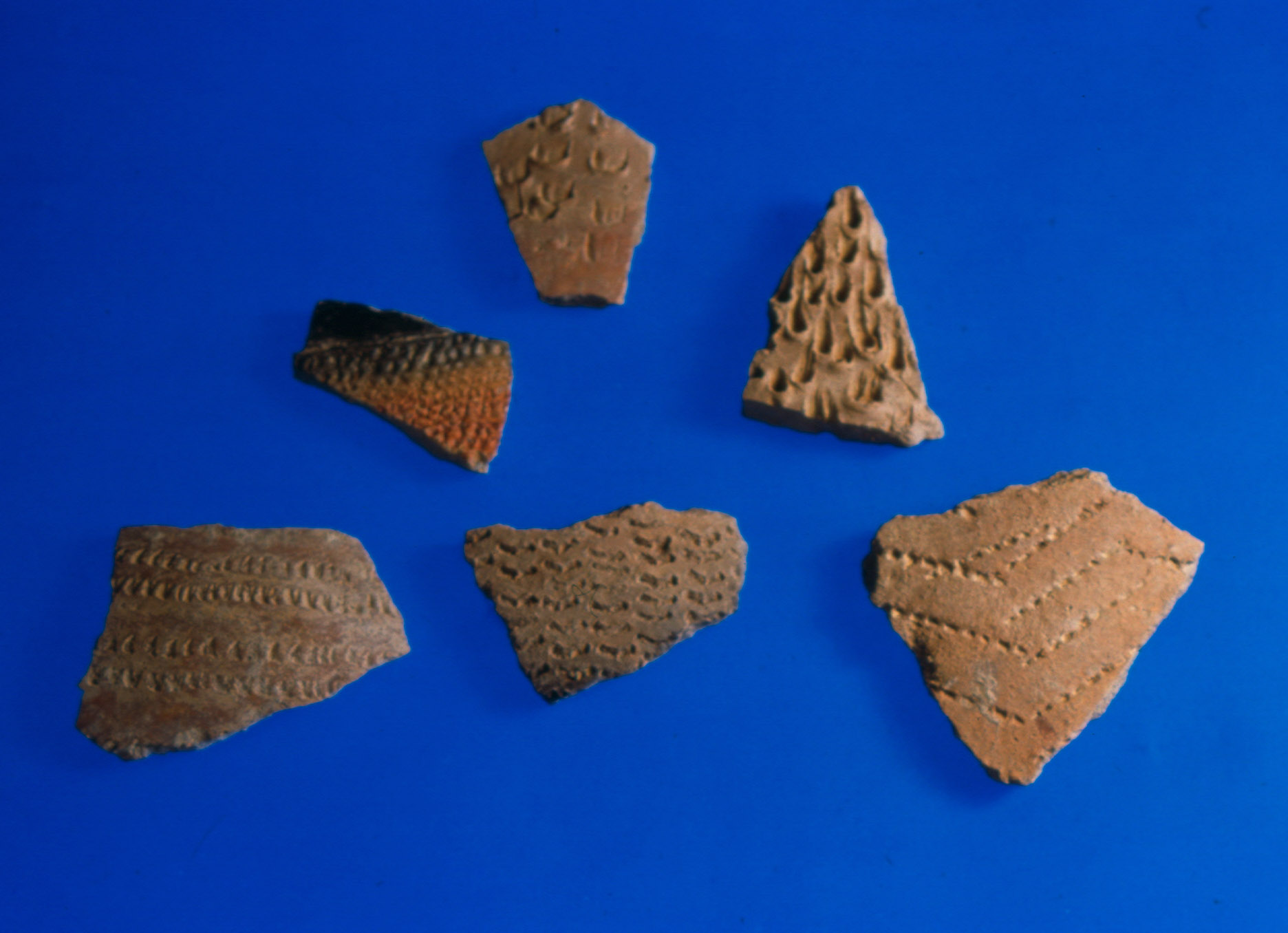 חורבת עוצה - חרסים מעוטרים בסגנון תרבות ואדי רבה משכבה 19 צילם דני שיאון